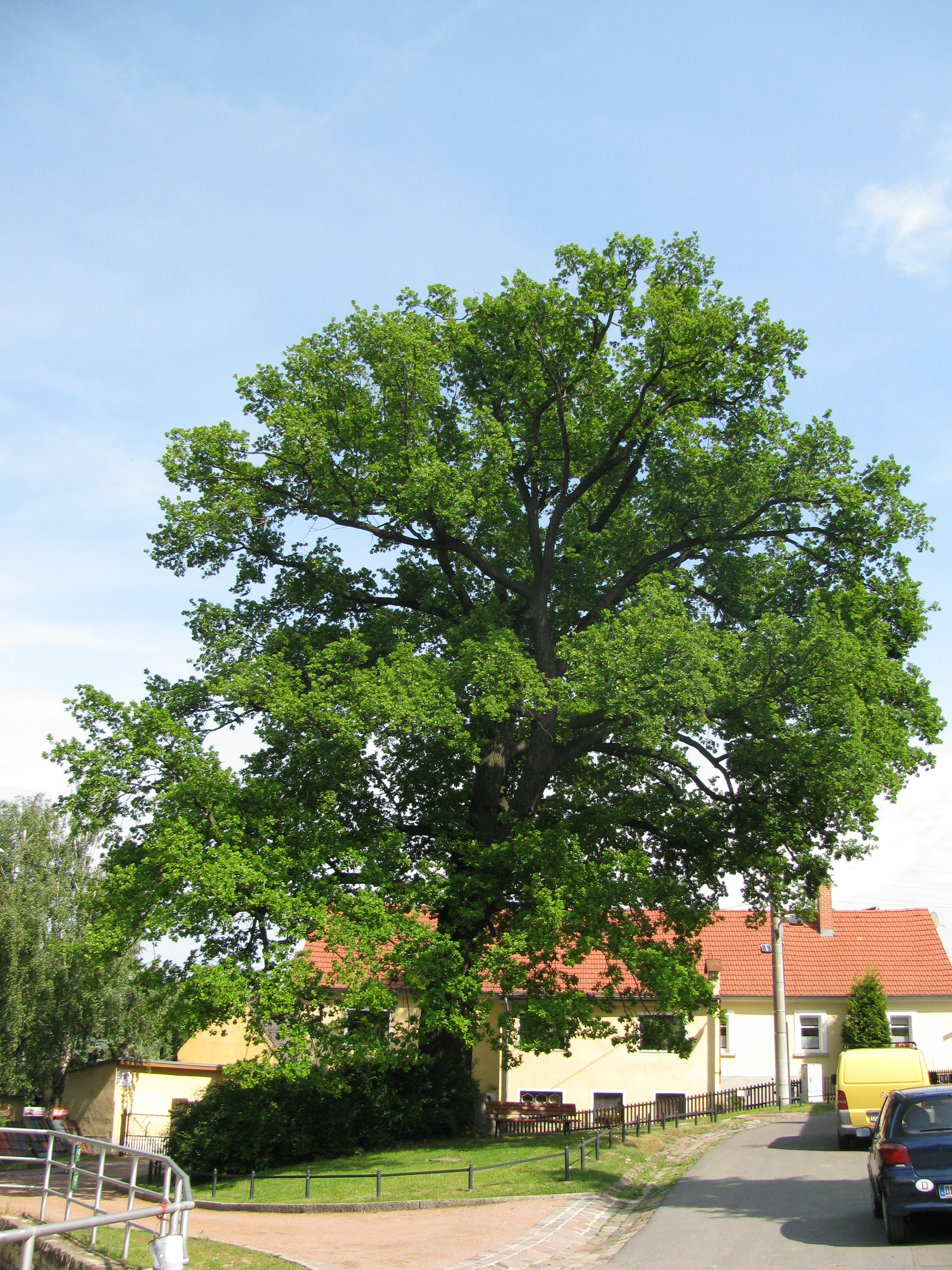 Luthereiche Kleinluga, Stadtteil von Dresden